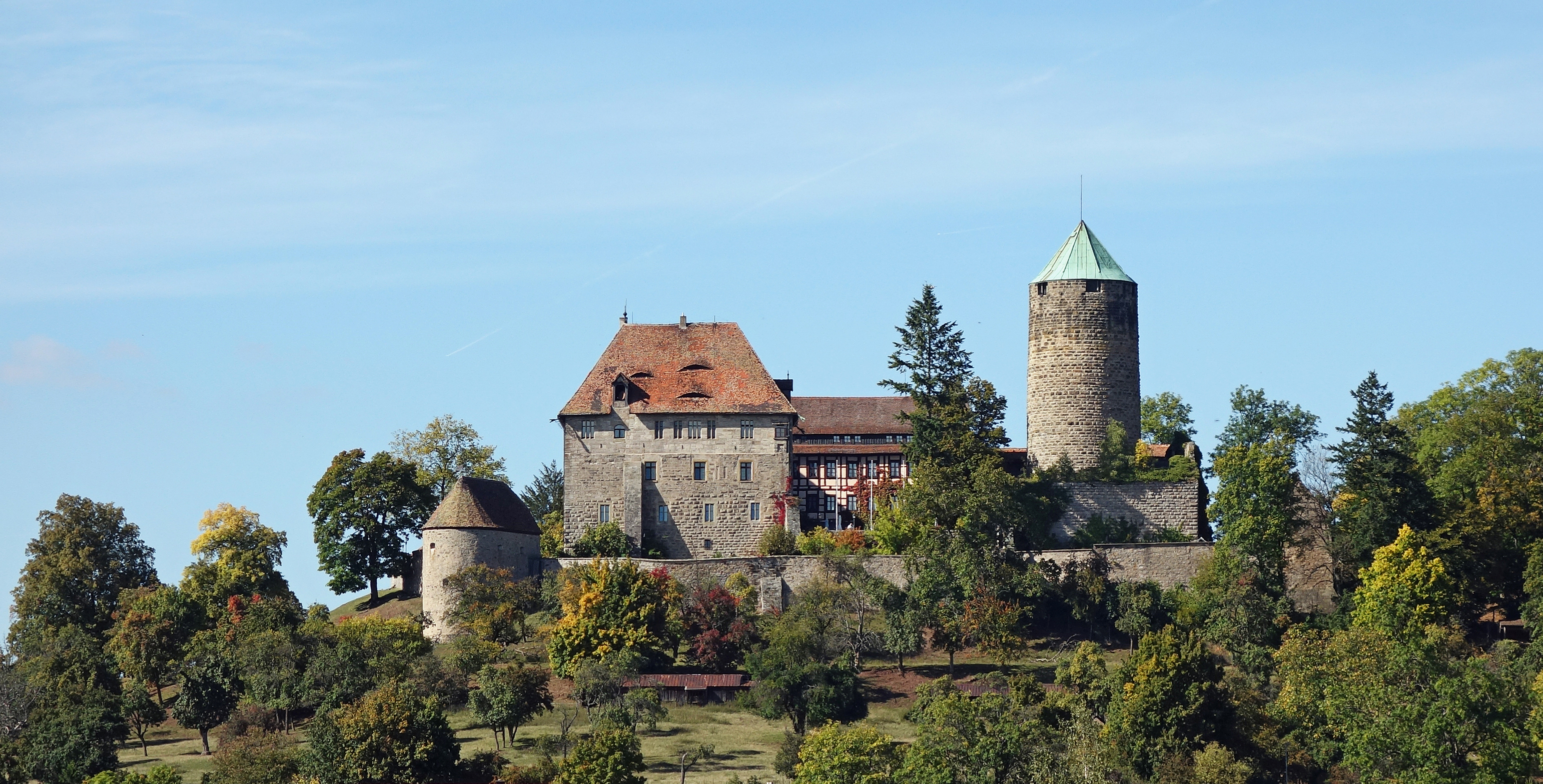 Die Burg Colmberg ist eine Burg auf dem 511 Meter hohen Heuberg im Altmühltal oberhalb von Colmberg in Bayern. Die Burg wurde um das Jahr 770 als kleine Palisadenburg mit hölzernem Turm errichtet und zwischen den Jahren 1150 und 1240 ausgebaut. Im Jahre 1964 ging die Burg in den Besitz der Familie Unbehauen aus Colmberg über, die auf der Burg ein Hotel mit Restaurant betreiben.